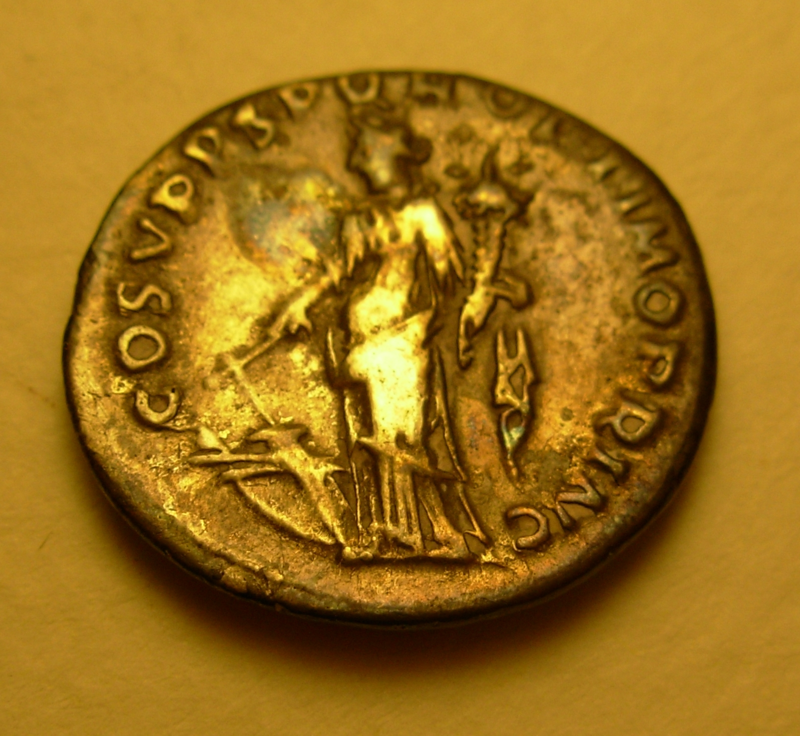 Moneta d'argento dell'Imperatore Traiano. Retro